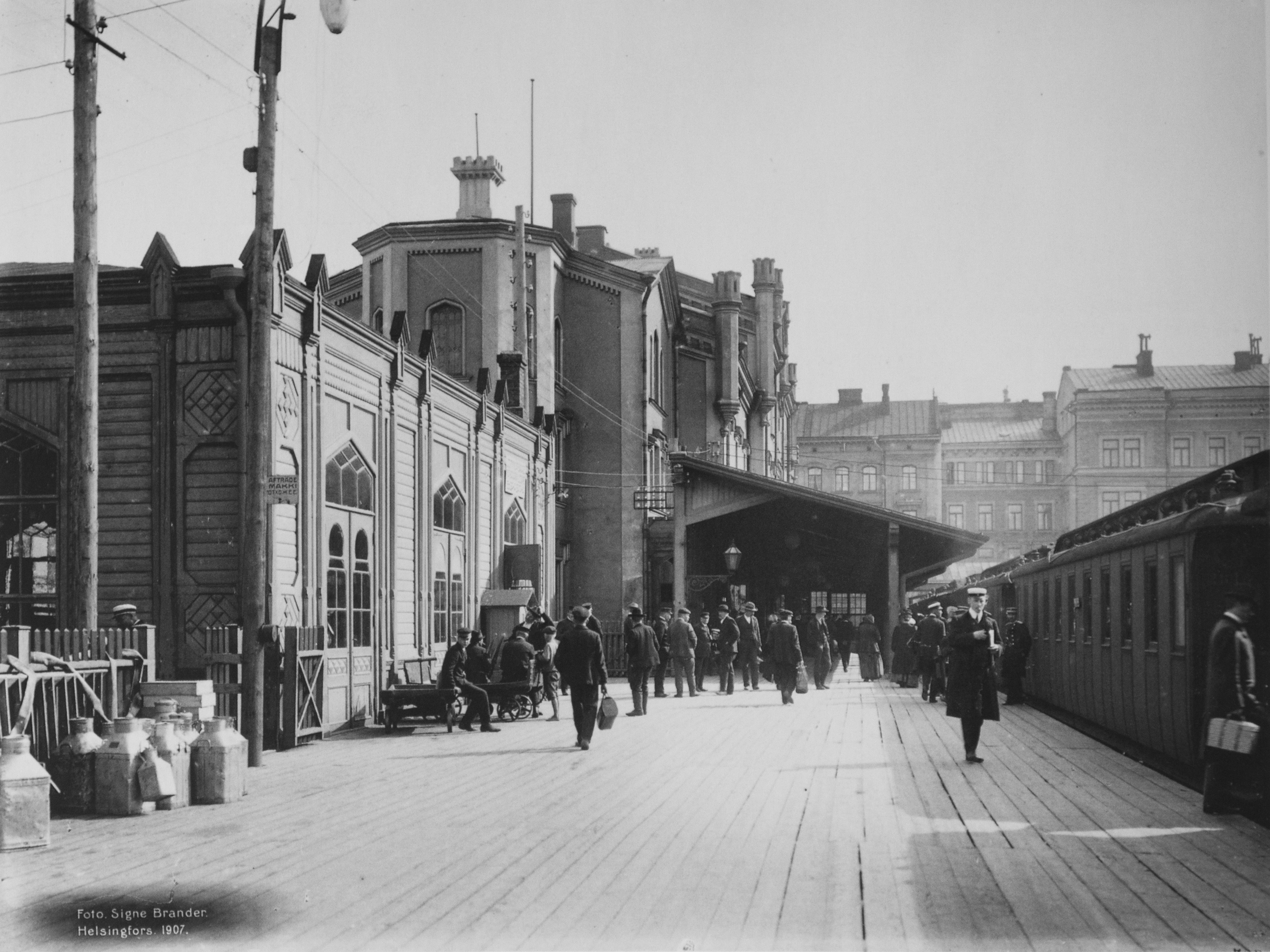 Helsingin vanhan rautatieaseman matkustajalaiturit vuonna 1907.